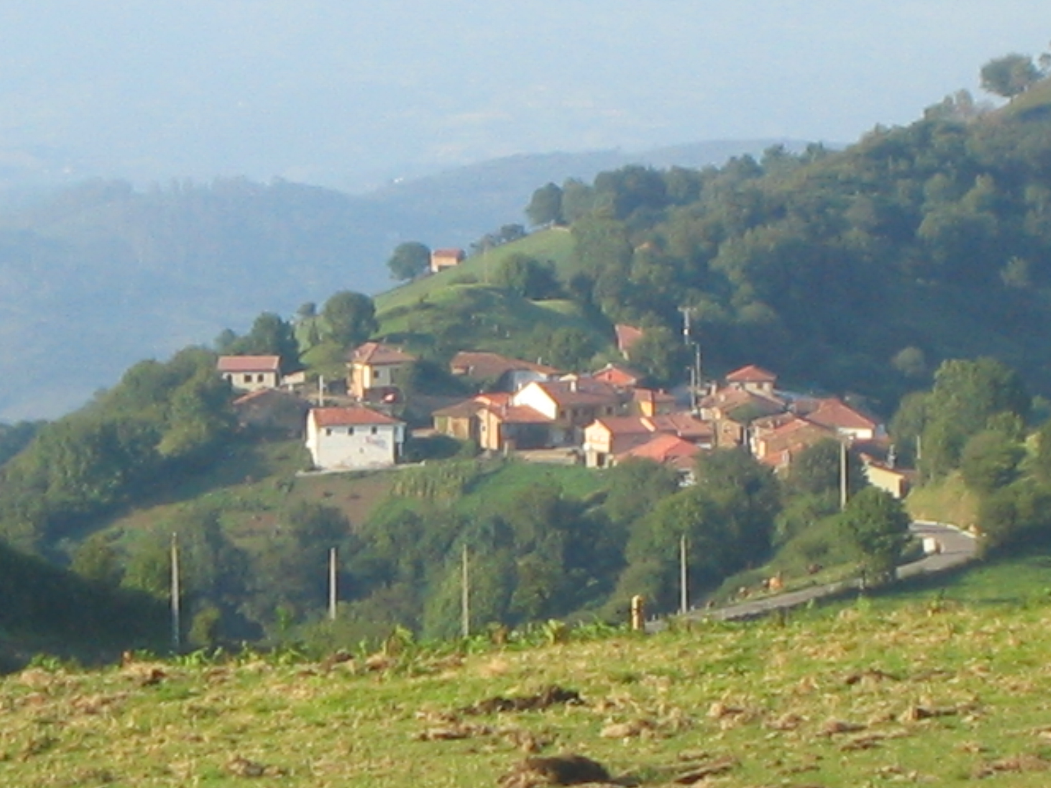 Foto desde las antenas del pueblo de Linares que pertenece al concejo de Proaza(Asturias)